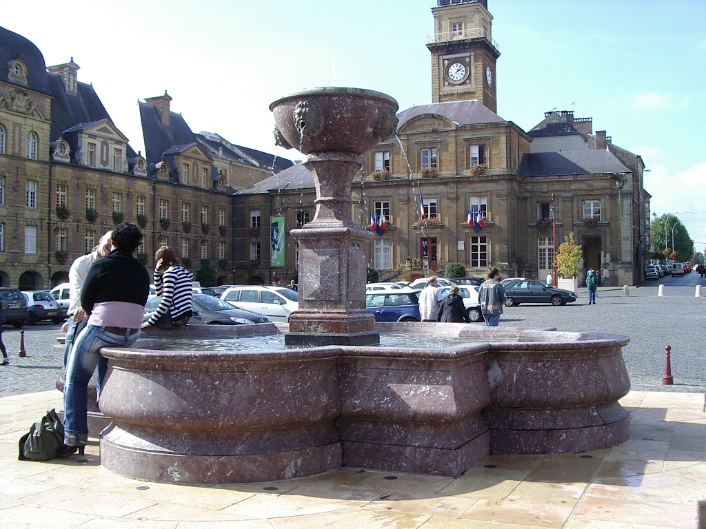 Fontaine Place Ducale Charleville-Mezières France